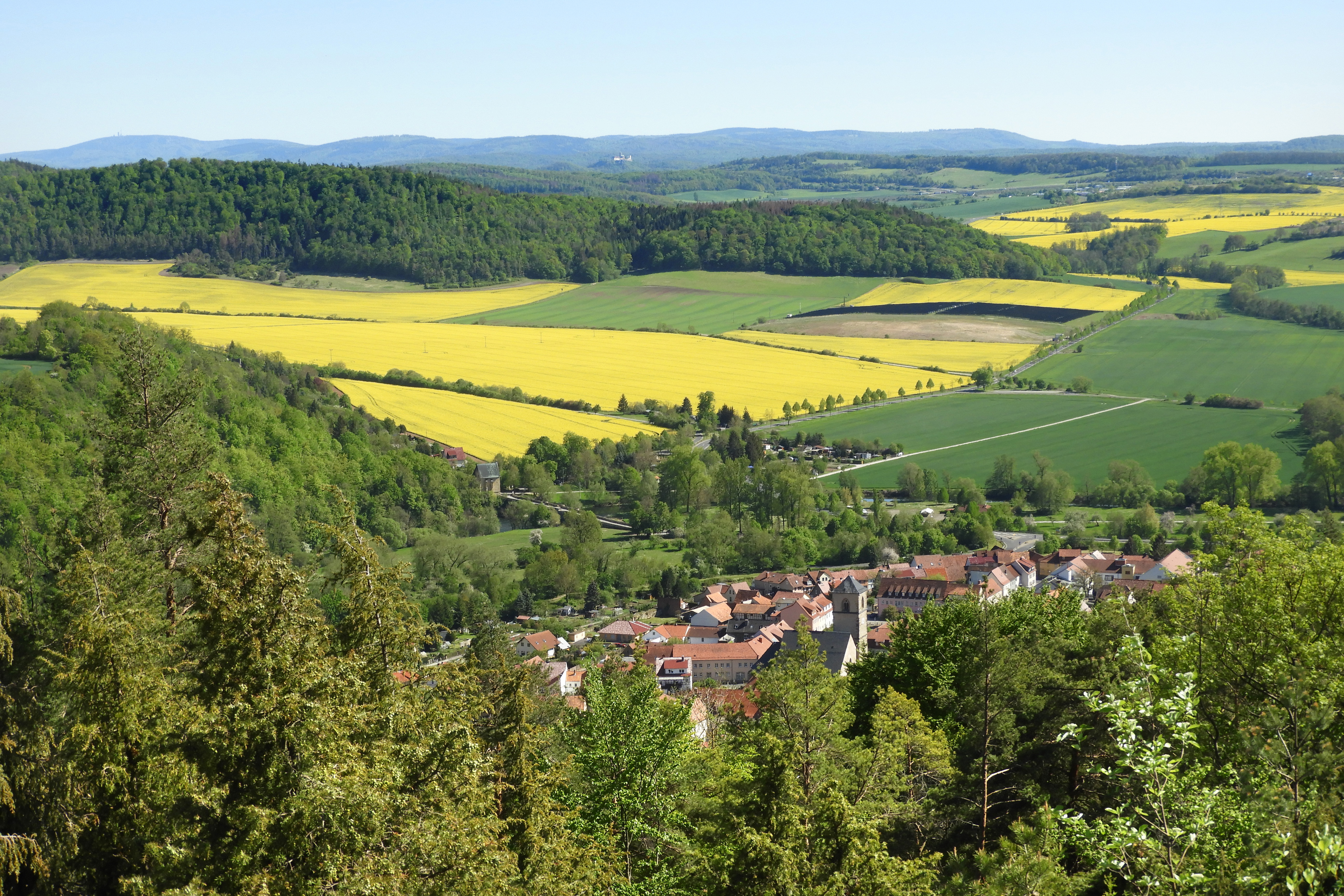 Der Aussichtspunkt „Wisch“ liegt im Naturschutzgebiet „Ebenauer Köpfe und Wisch“ und im Flora-Fauna-Habitat-Gebiet „Creuzburger Werratalhänge“ im westthüringischen Wartburgkreis. Das Naturschutzgebiet hat die thüringeninterne Kennung 64 und den WDPA-Code 162830. Das FFH-Gebiet hat in Thüringen die Nummer 35, die europäische Gebietsnummer 4927-303 und den WDPA-Code 555520295.